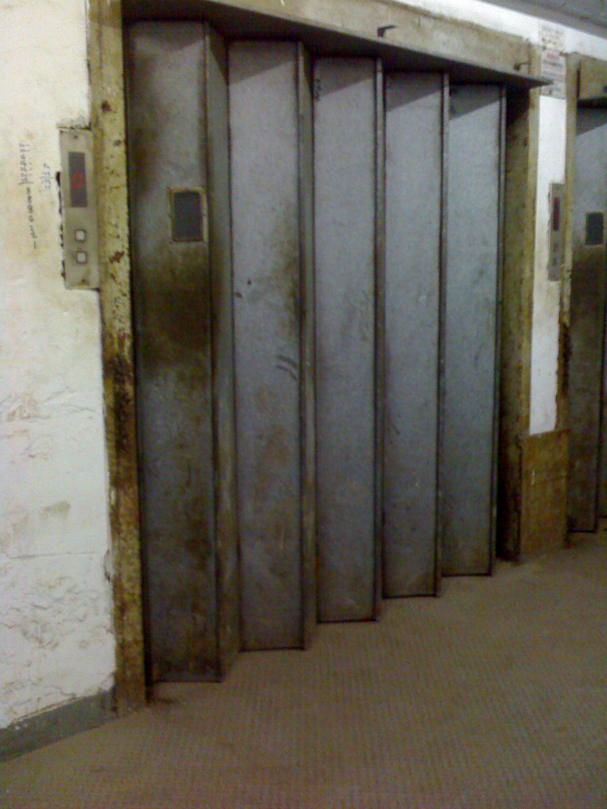 Freight elevators